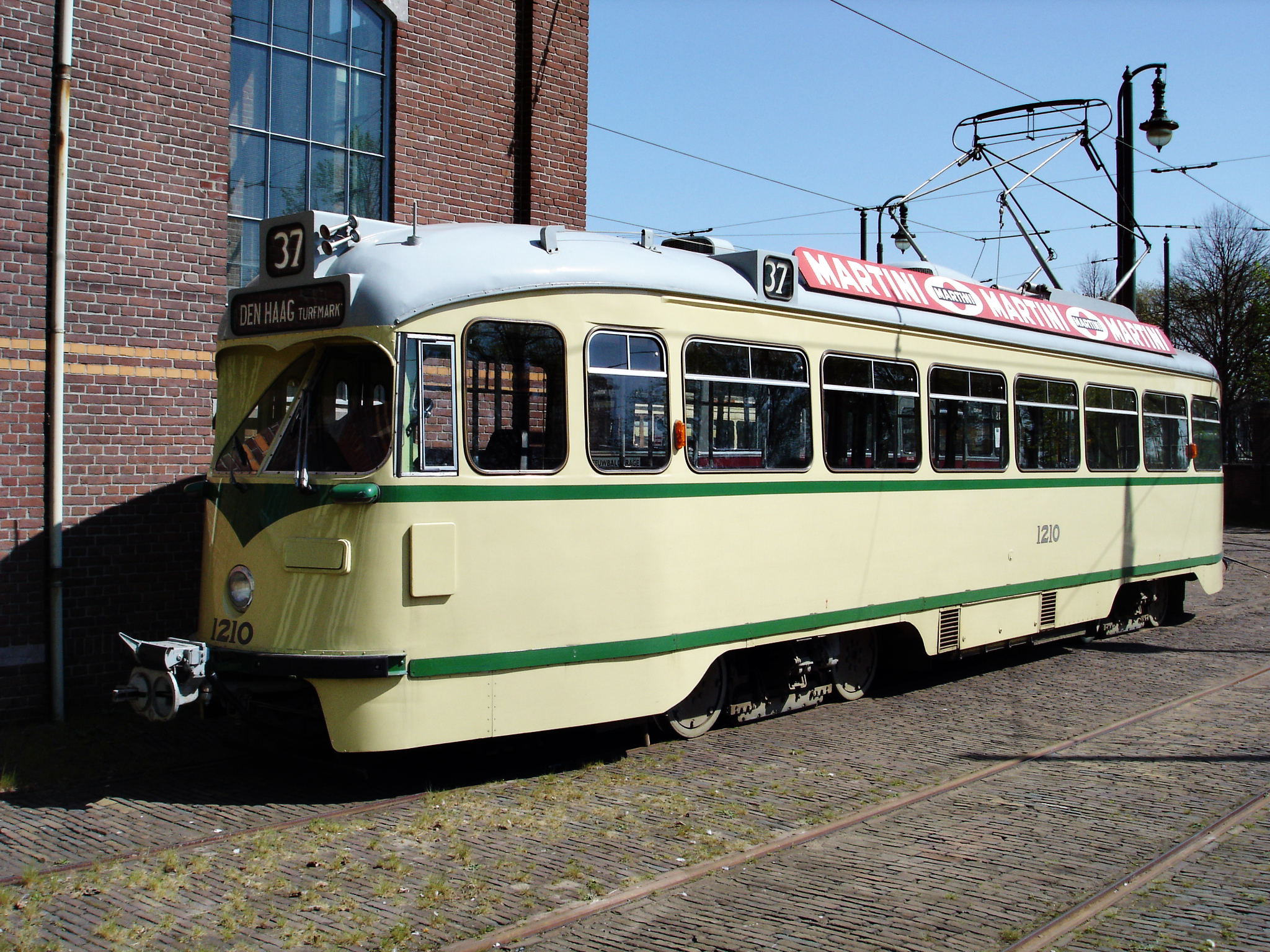 HTM museumtram/museum streetcar